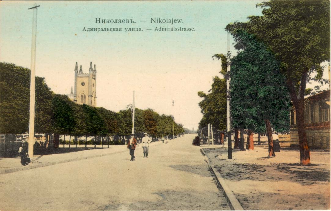 „Nikolajew. Admiralsstrasse.“